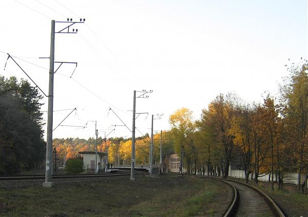 Залізнична платформа Лісова Буча